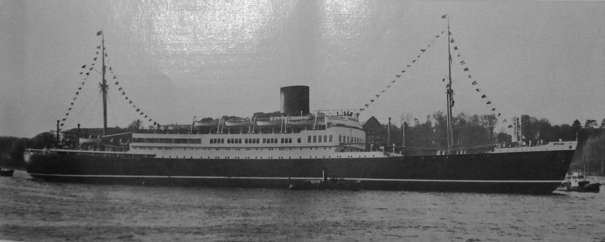 Werftprobefahrt des NDL-Schiffes Scharnhorst 1935